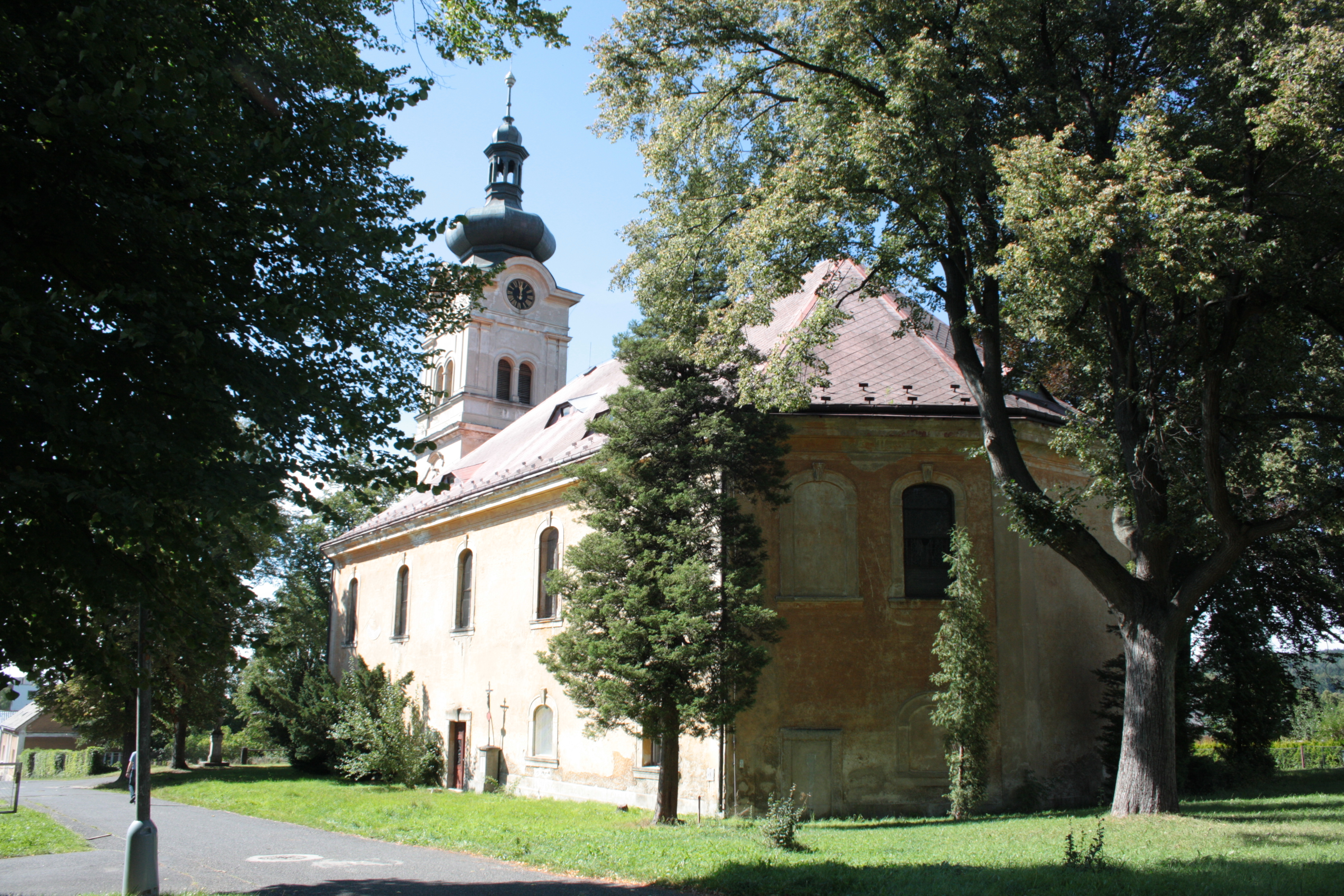 Pohled od východu na kostel svaté Kateřiny v Novém Městě pod Smrkem.